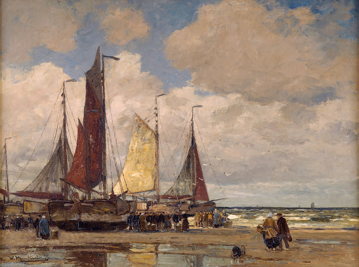 Fischervolk beim Entladen der Boote. Signiert. Öl auf Leinwand, 60 x 80 cm